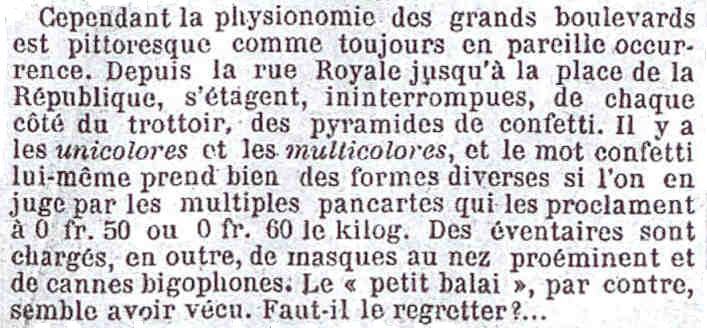 Détail de l'article "Le mardi gras" paru en page 4.